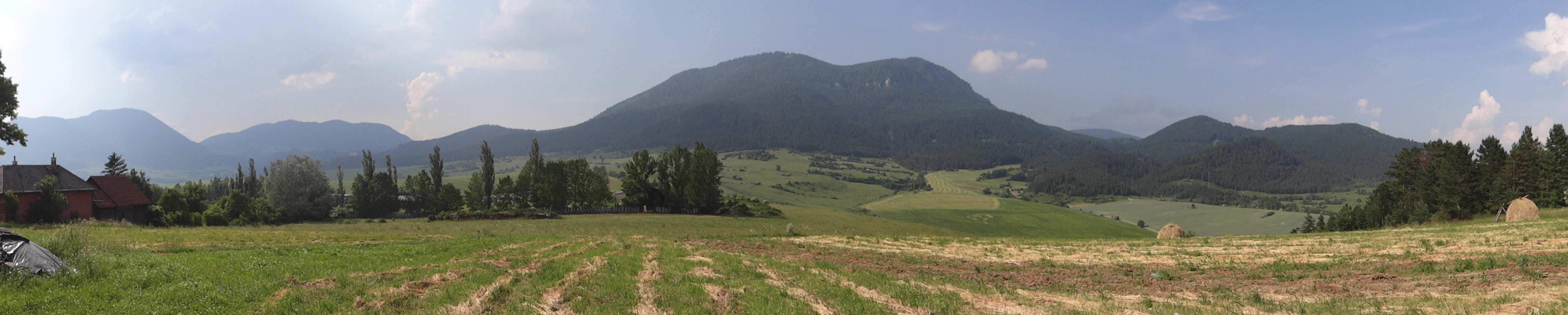 Chočské vrchy from Martinček, panorama